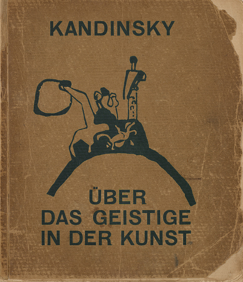 Umschlag Wassily Kandinsky: "Über das Geistige in der Kunst", veröffentlicht 1911 bei Piper, München, datiert 1912